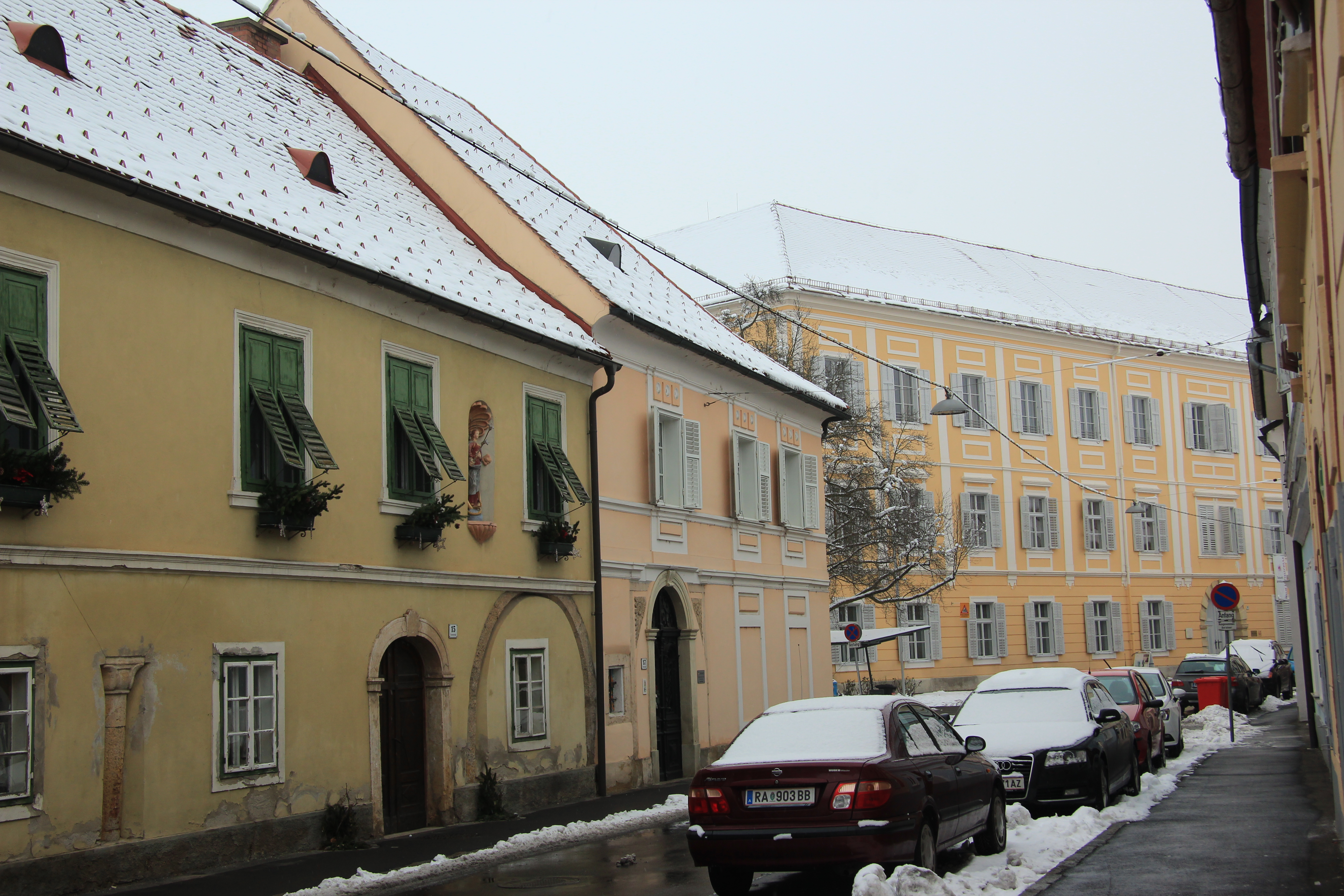 Palais Nadsdy in Bad Radkersburg, Emmenstraße 15 & 17